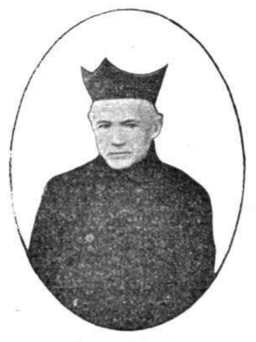 Angel María de Arcos